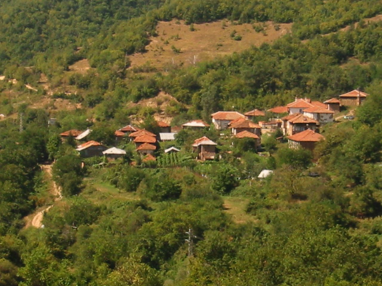 Das kleine und wunderschöne Dorf Kashina liegt fast versteckt zwischen den Hügeln des südwestlichen Seite des Piringebirges in Bulgarien.